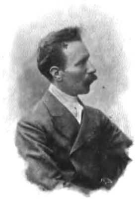 commediografo e critico teatrale italiano